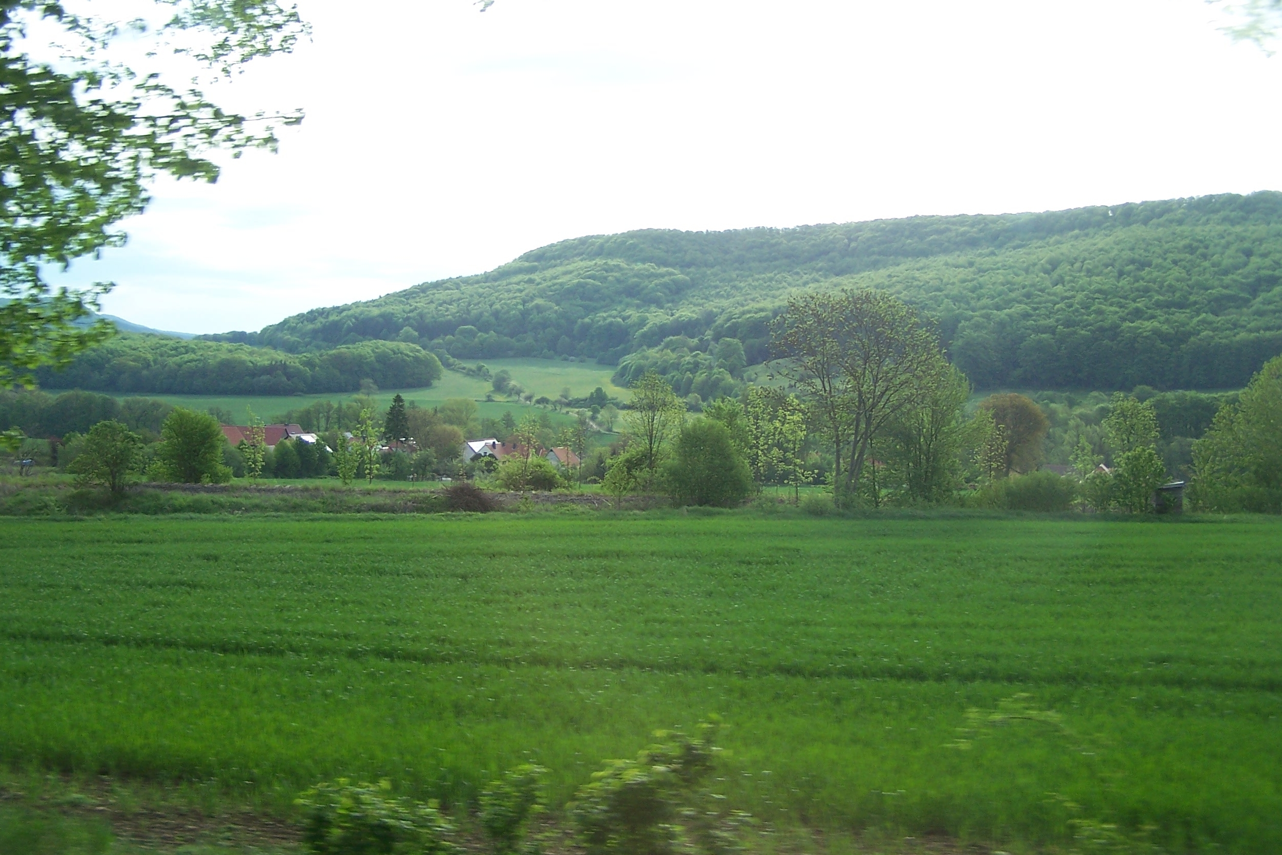 Der Neuberg mit dem Naturschutzgebiet Ibengarten (am bewaldeten Hang) und der Ortsteil Glattbach bei Dermbach in der Rhön.